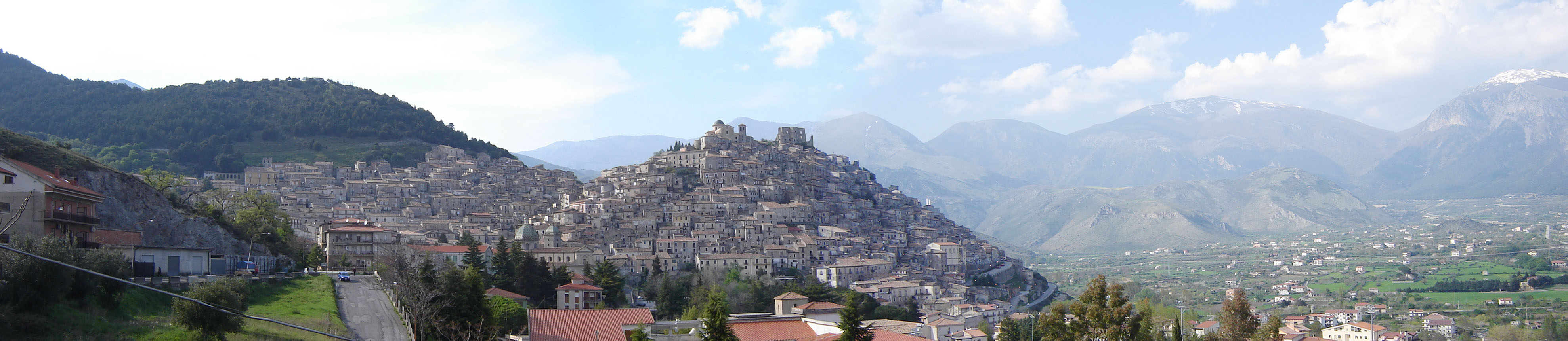 Morano Calabro Panorama completo